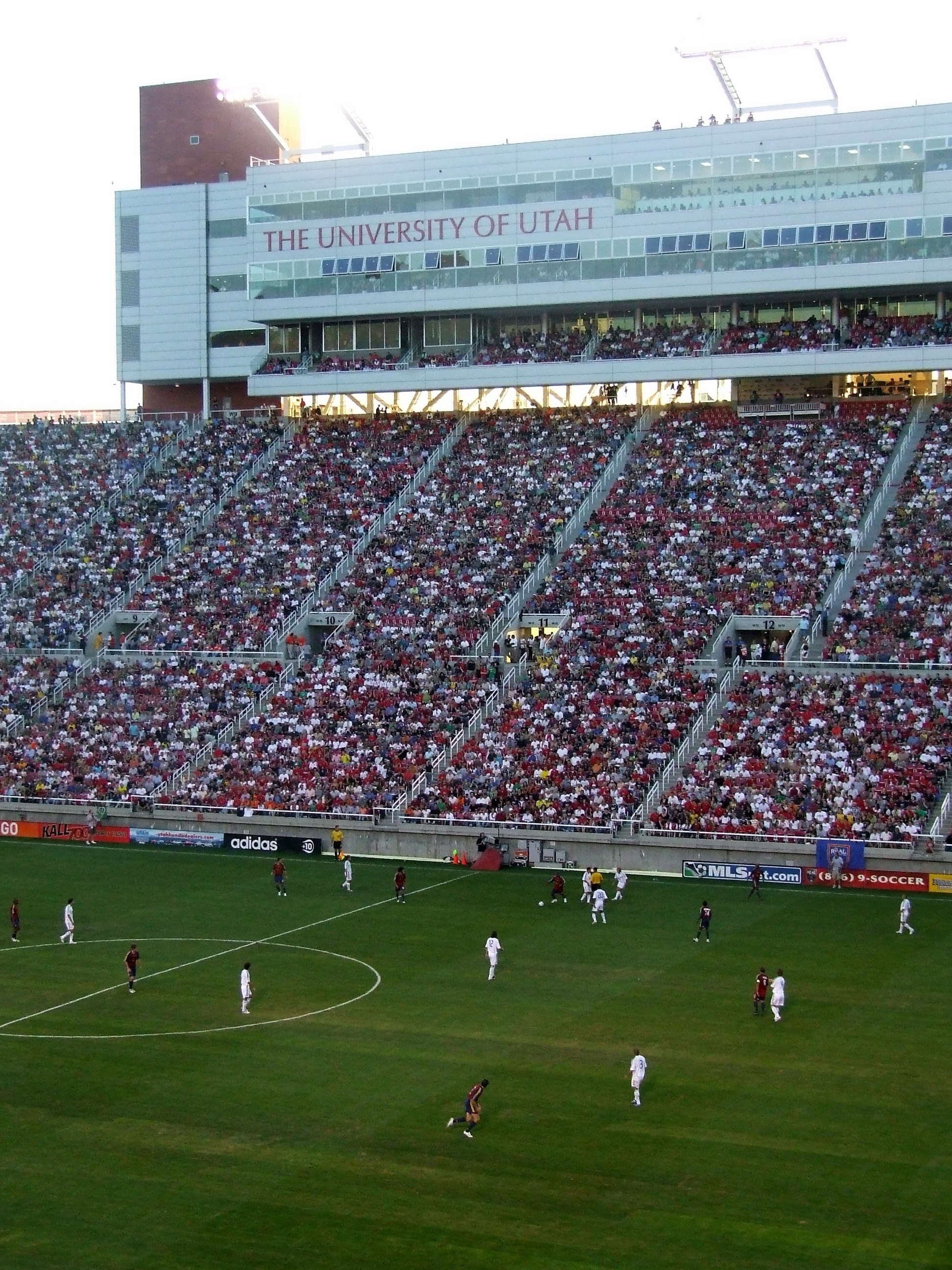 Real Madrid vs Real Salt Lake Futbol Game 8-12-2006 8-05-00 PM